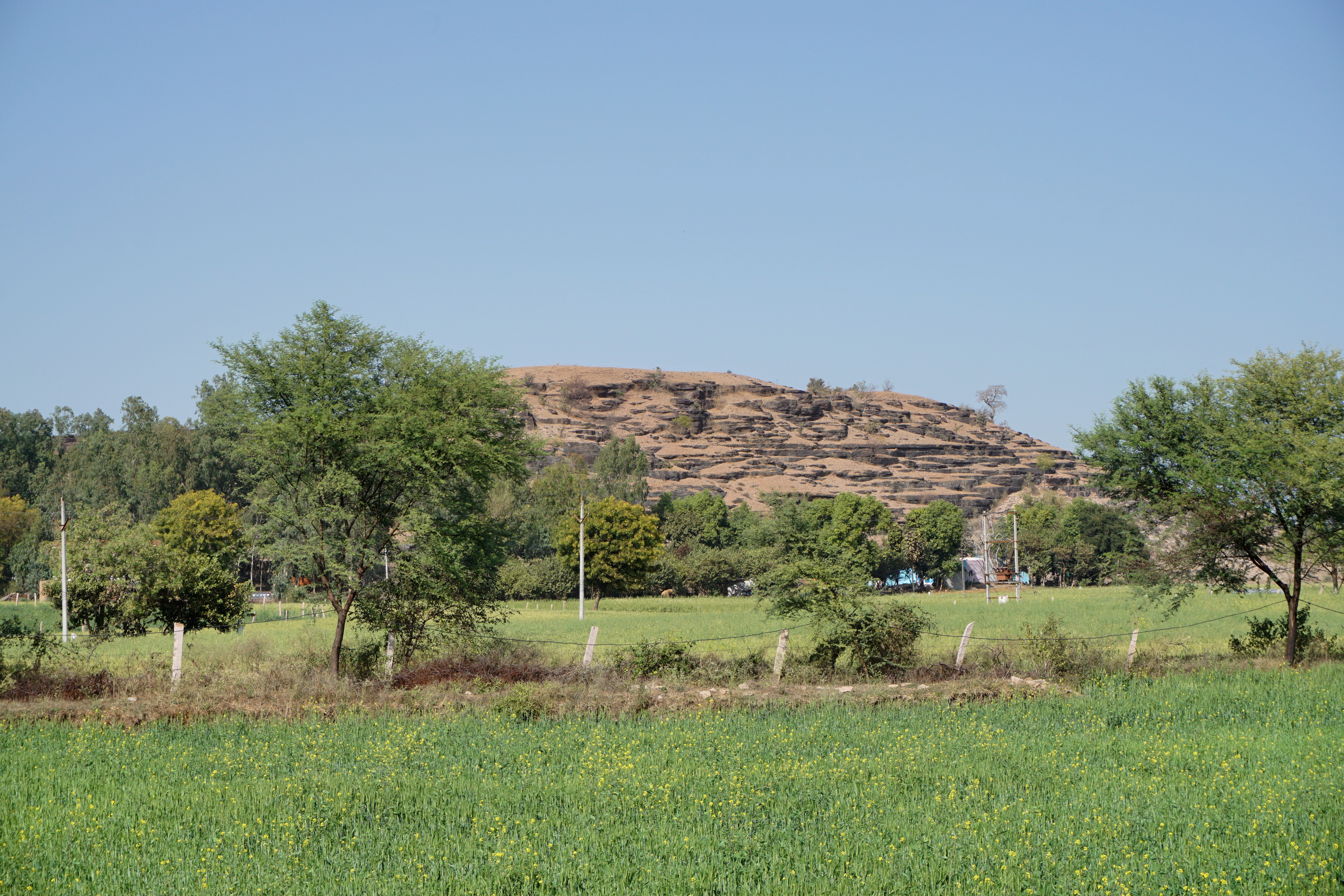 Udayagiri Caves, Vidisha, India